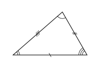 Triangle scalène (quelconque).